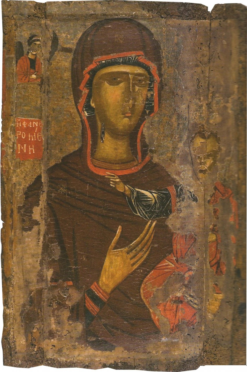 Αμφιπρόσωπη λιτανευτική εικόνα με την Παναγία Γλυκοφιλόυσα και την Παναγία Οδηγήτρια Β΄ μισό 14ου αι. Ιερός ναός Αγίου Προκοπίου